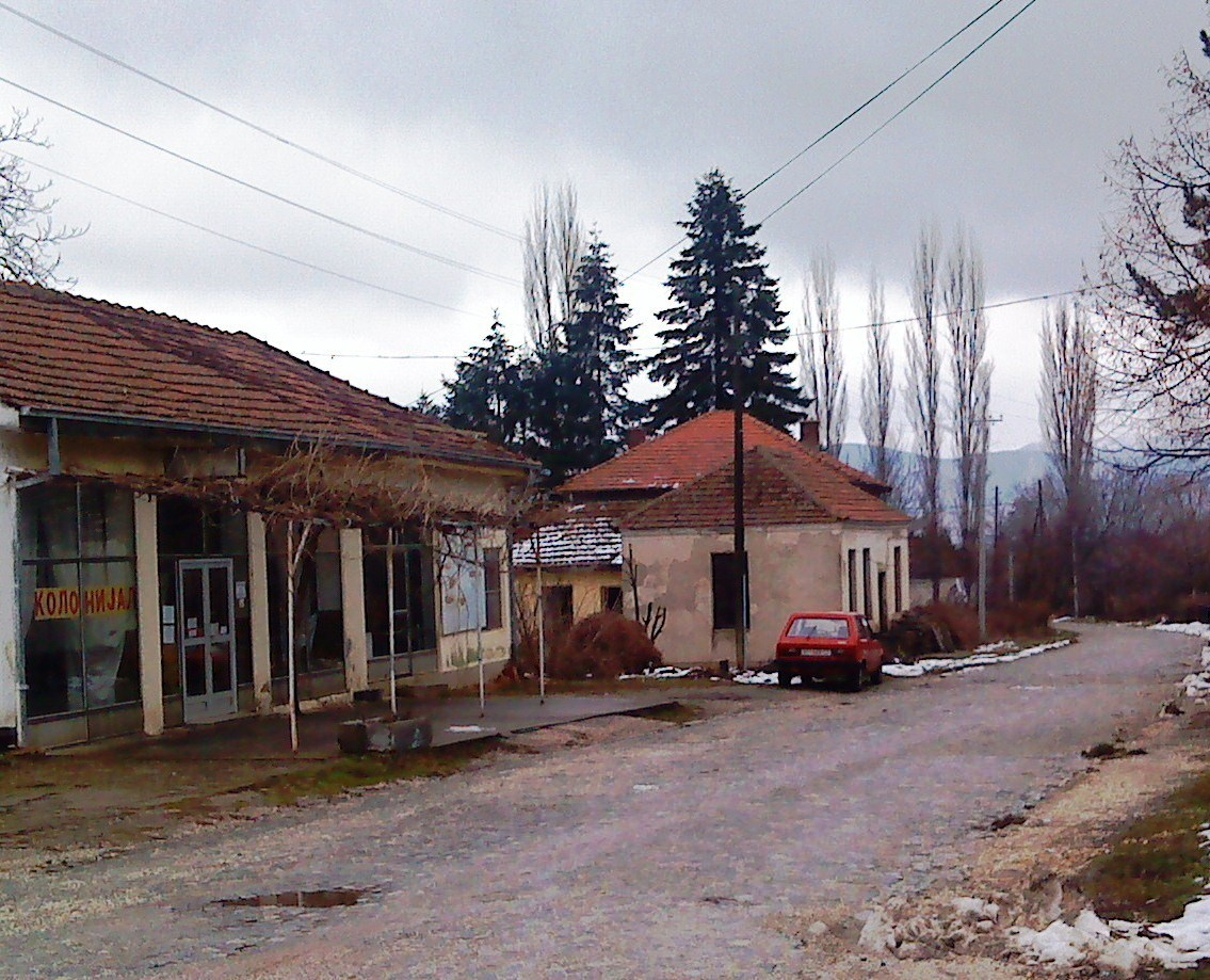 с.Кажани Ресторан со продавница Интернационал и Месна канцеларија